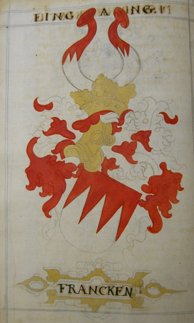 Um Zusätze vermehrte Abschrift von Sigmund Feyerabends Frankfurter Ausgabe (1578/1579) des Turnierbuchs von Georg Rüxner (Jörg Rugen), Handschrift auf Papier in zwei Bänden, 17. Jahrhundert. Detail